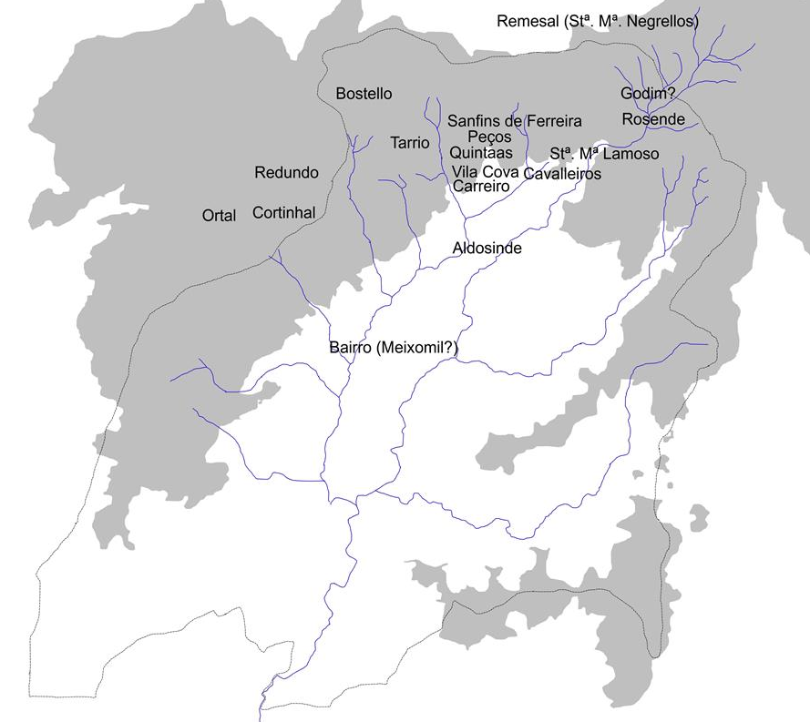 Territórios integrantes da Igreja e Comenda de Sanfins de Ferreira, antigo Couto e Mosteiro